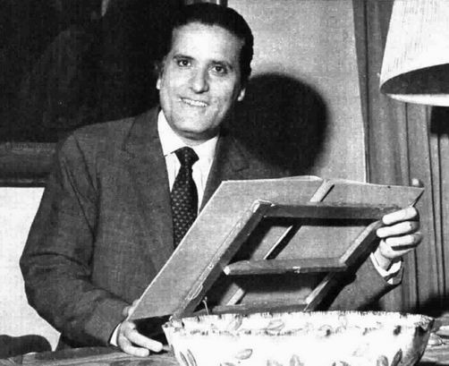 Italian composer Franco Mannino